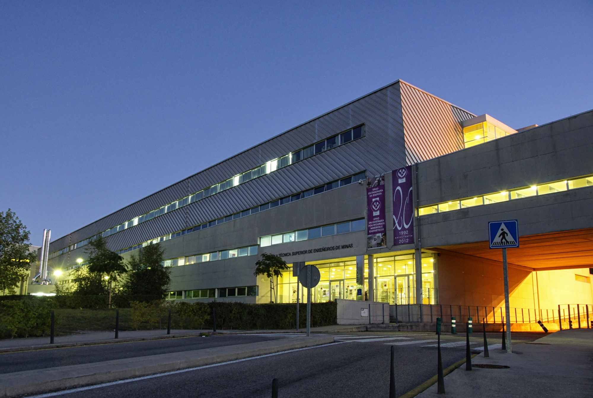 Fotografía de la entrada del edificio de la ETSE de Minas de la Universidad de Vigo de noche